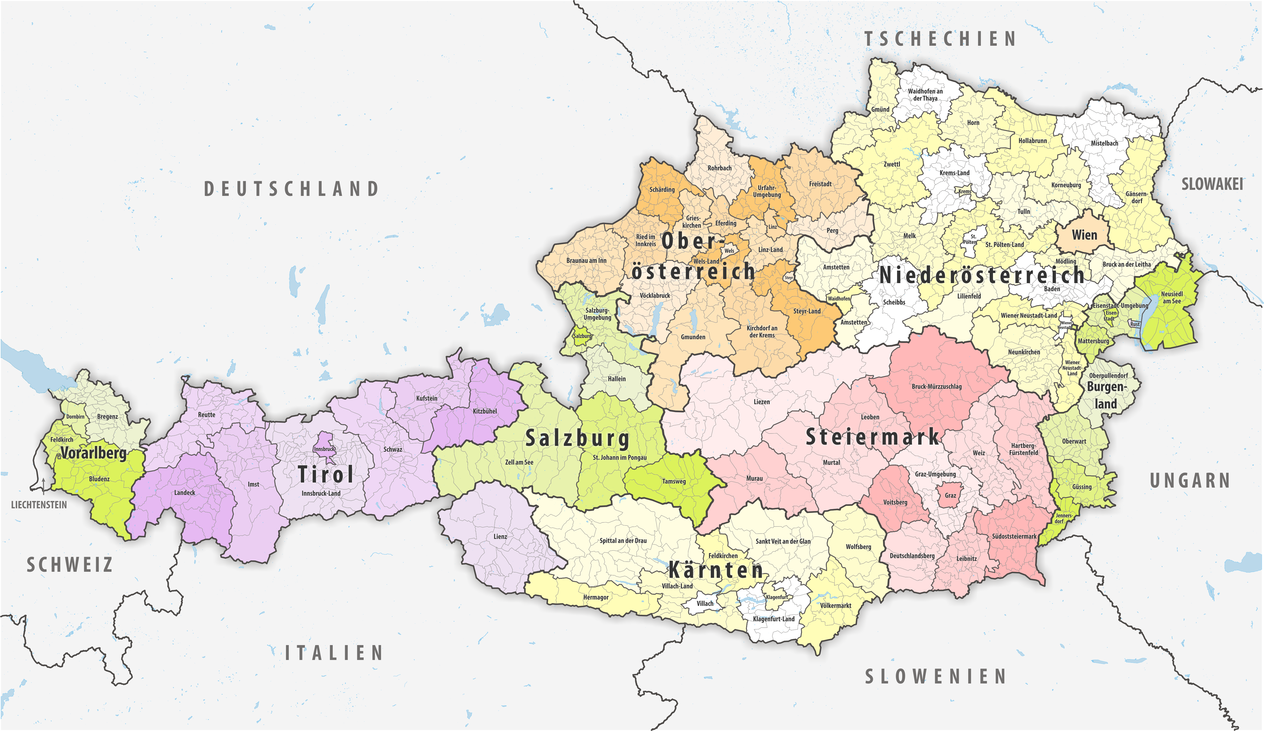 Bundesländer, Bezirke und Gemeinden von Österreich